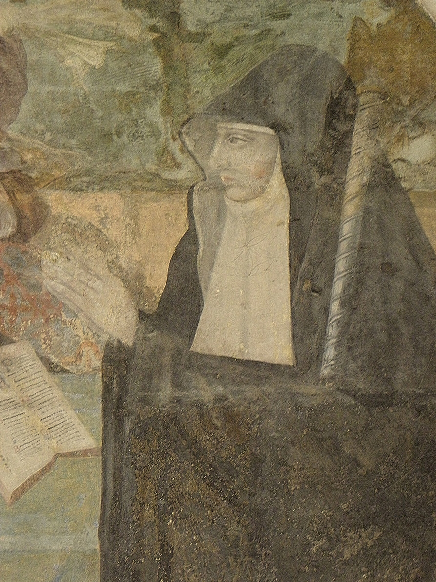 Renée de Bourbon (1468-1534), abbesse de la Trinité de Caen, 27ème abbesse de Fontevraud de 1491 à 1534. Peinture murale de la salle capitulaire de l'abbaye de Fontevraud.